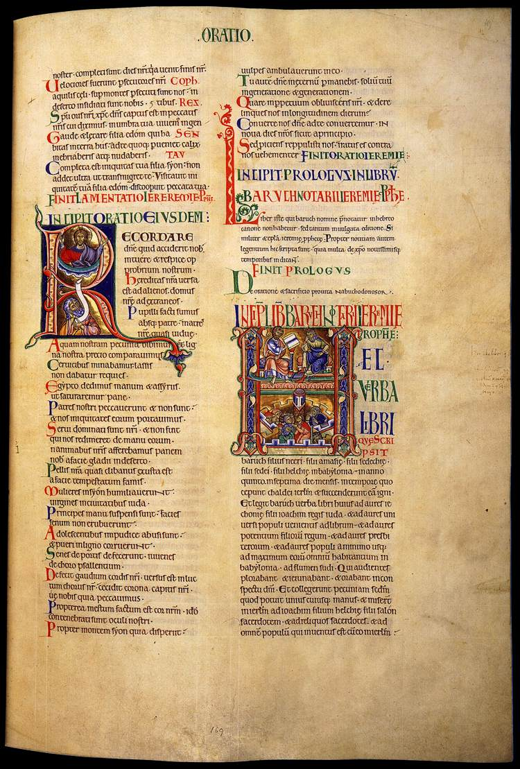 Winchester Bible. Fol.169.